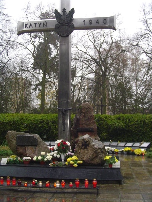 Szczecin, Cmentarz Centralny: Krzyż Katyński - pomnik ofiar obozu w Katyniu.